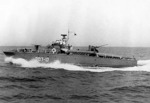 טרפדת ט-207 נושאית סירות קאיק של שייטת 13.